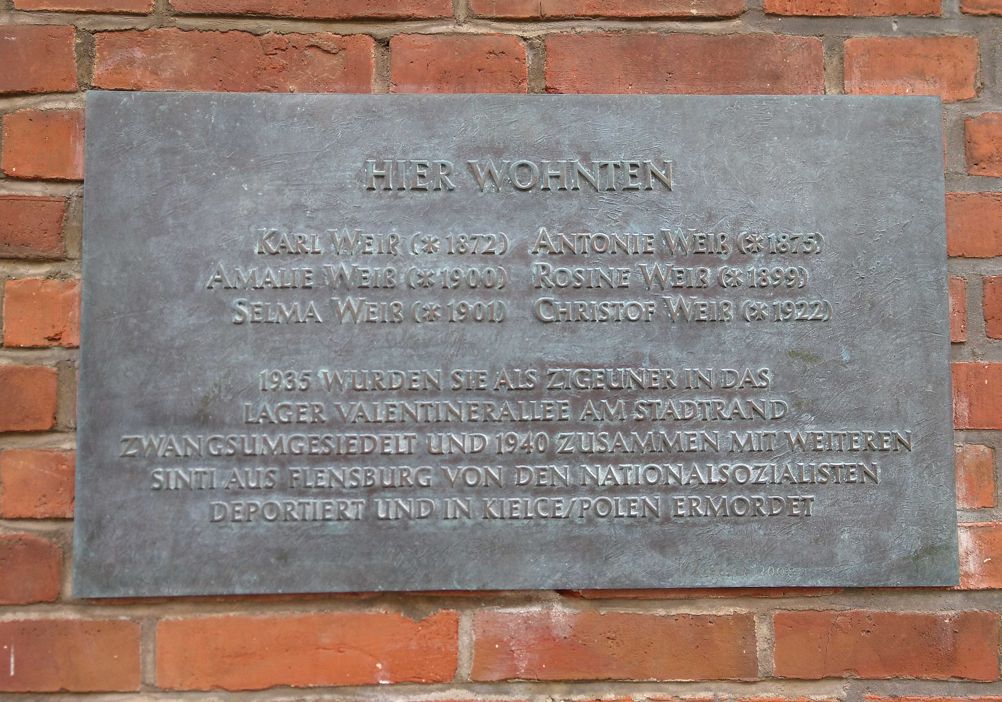 Die Tafel befindet sich in der Norderstraße 104, 24939 Flensburg; die Valentinerallee in der Südstadt. Die Inschrift der Tafel lautet: Hier wohnten Karl Weiß (*1872) Antonie Weiß (*1875) Amalie Weiß (*1900) Rosine Weiß (*1899) Selma Weiß (*1901) Christof Weiß (*1922) 1935 wurden sie als Zigeuner in das Lager Valentinerallee am Stadtrand zwangsumgesiedelt und 1940 zusammen mit weiteren Sinti aus Flensburg von den Nationalsozialisten deportiert und in Kielce/Polen ermordet